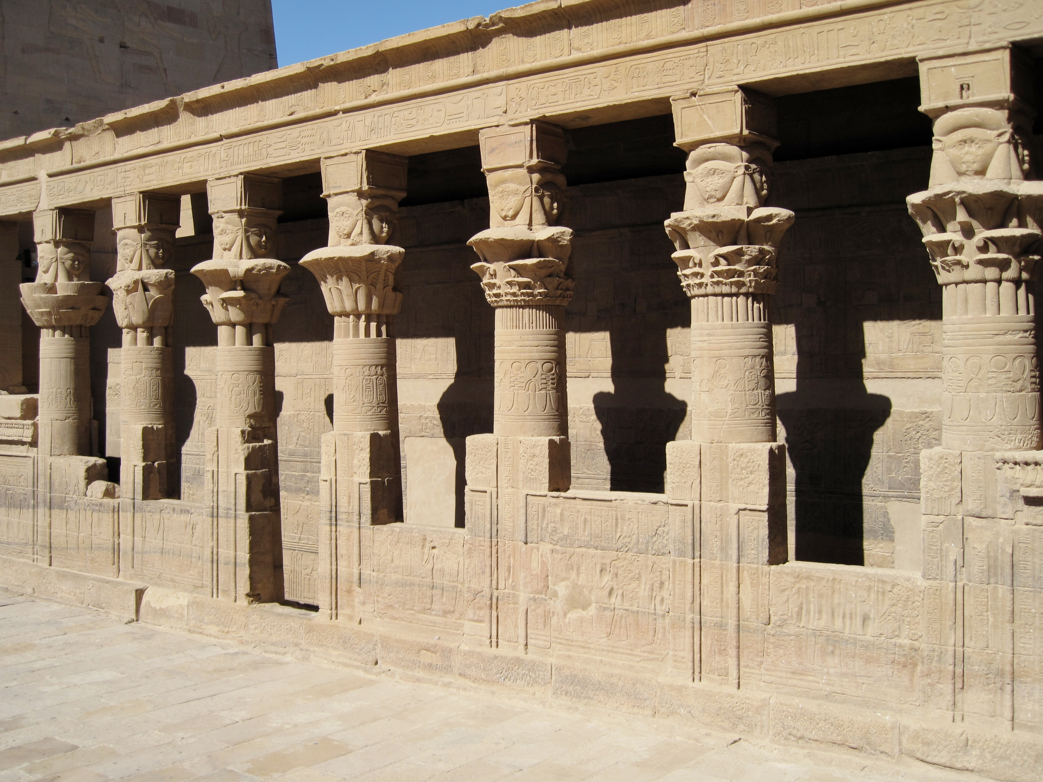 Säulen des Mammisi im Isis-Tempel von Philae auf der Insel Agilkia, Ägypten